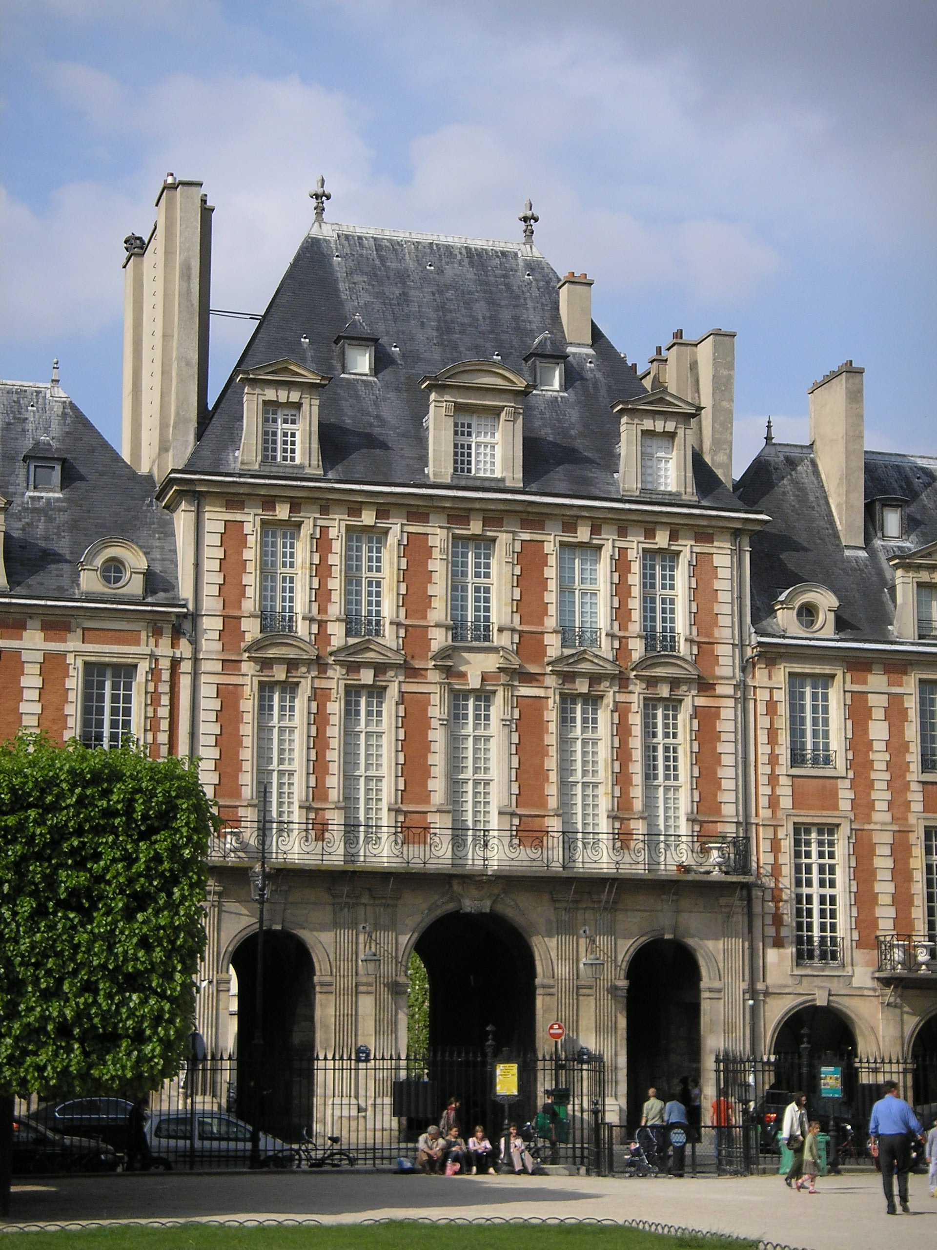 Place des Vosges in Paris, the Pavillion de la Reine.